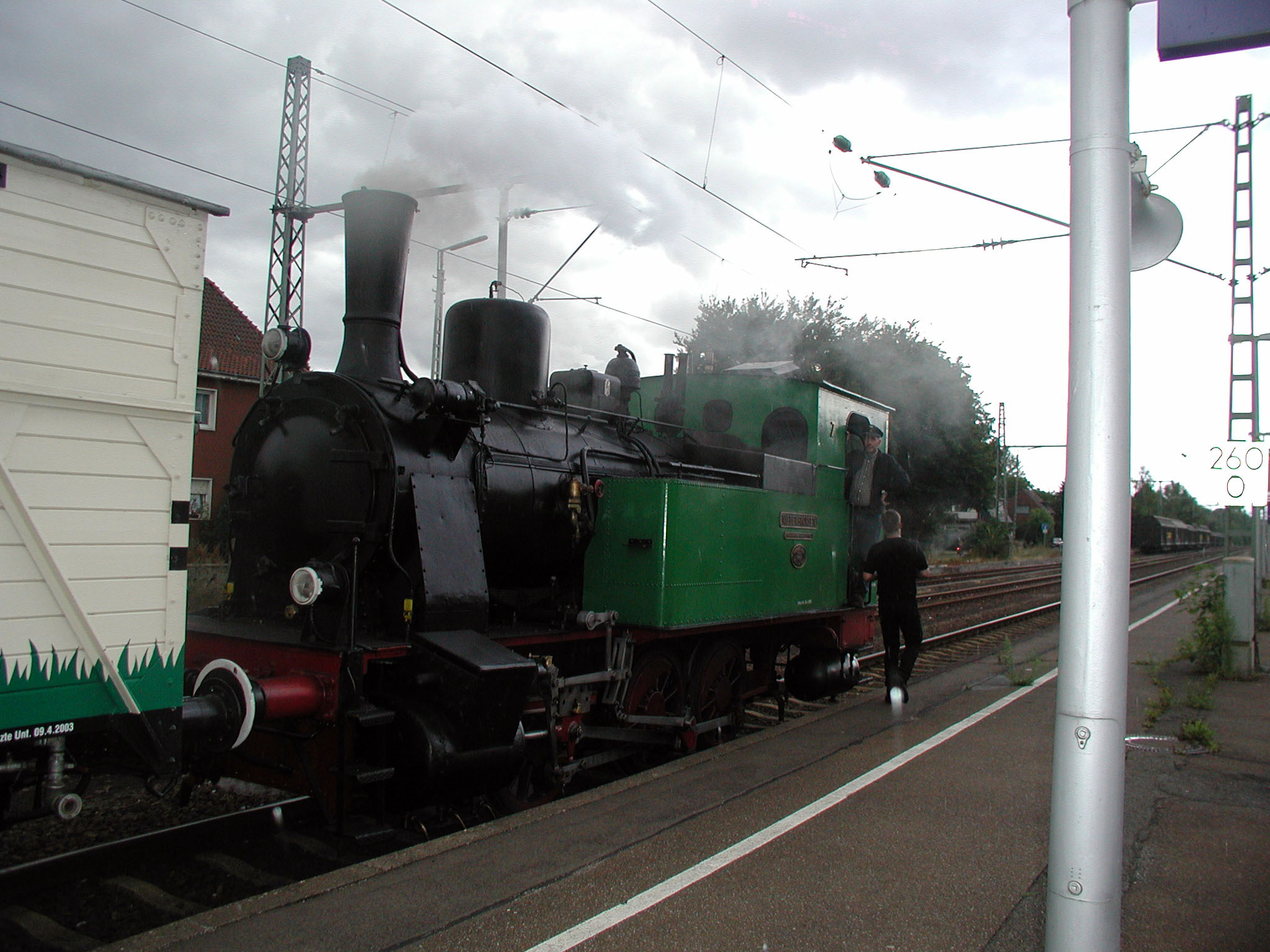 Haselünne, Historische Eisenbahn